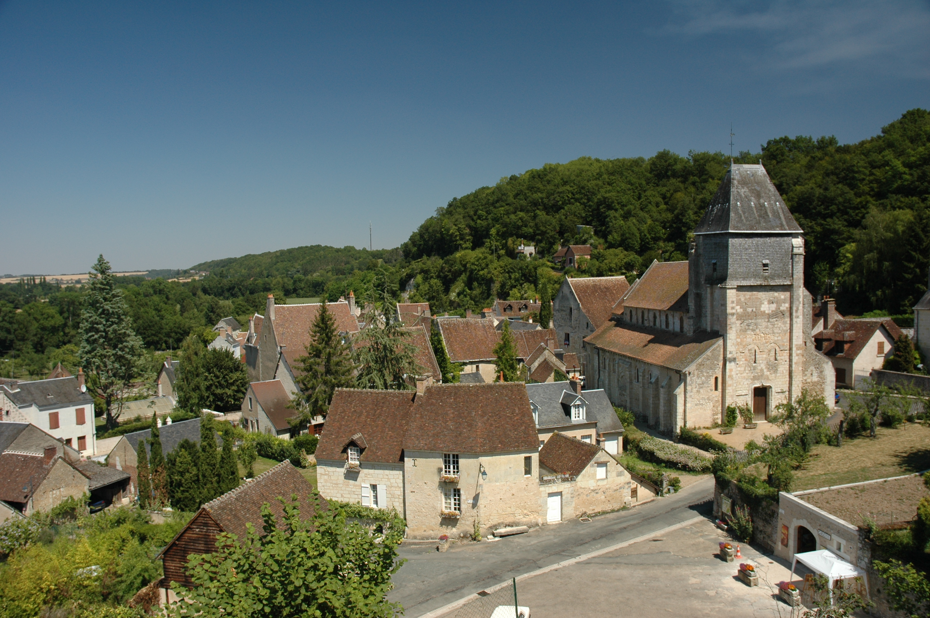 France Loir-et-Cher Lavardin vue depuis le château Photographie prise par GIRAUD Patrick